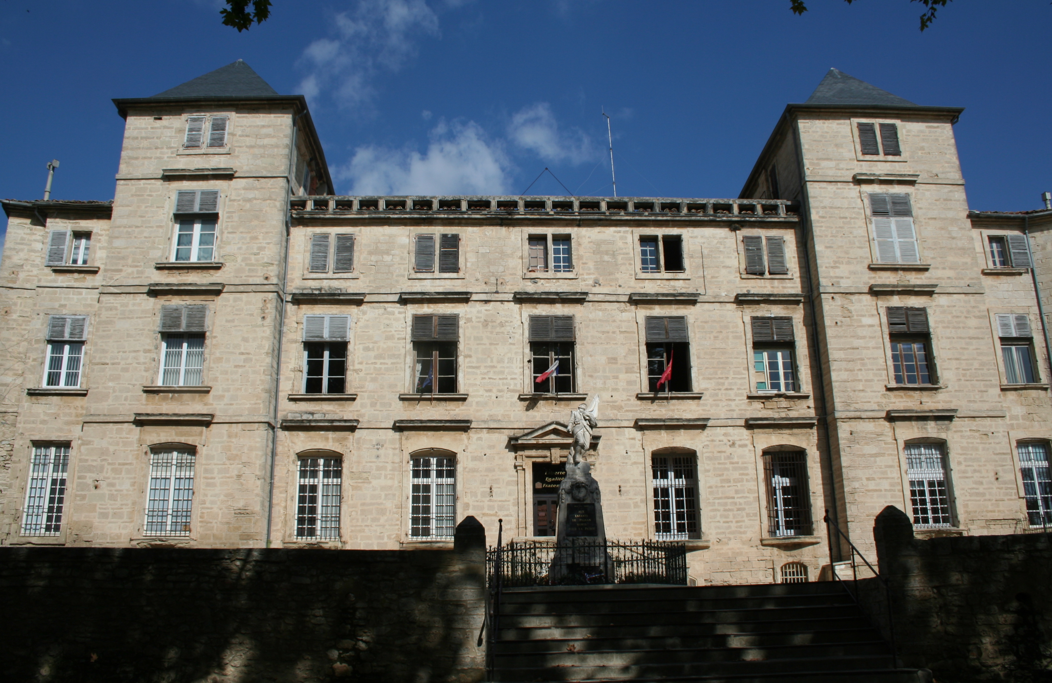 Pignan (Hérault) - Château de Turenne (XVIIe siècle) construit par Gabriel d'Hebles et Henri de Baschi du Cayla, actuelle mairie depuis 1895.